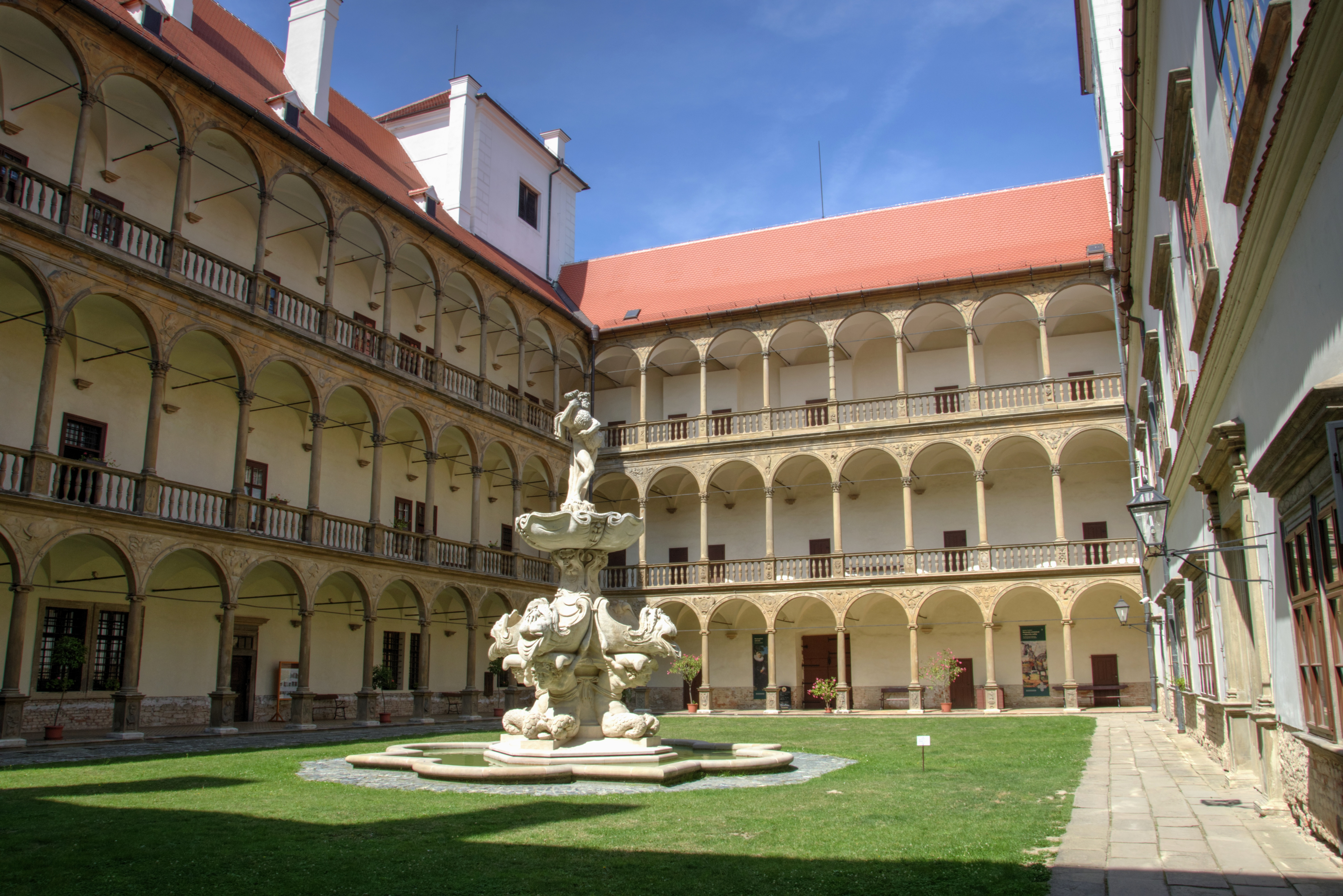 Zámek Bučovice, Zámecká 1, Bučovice.